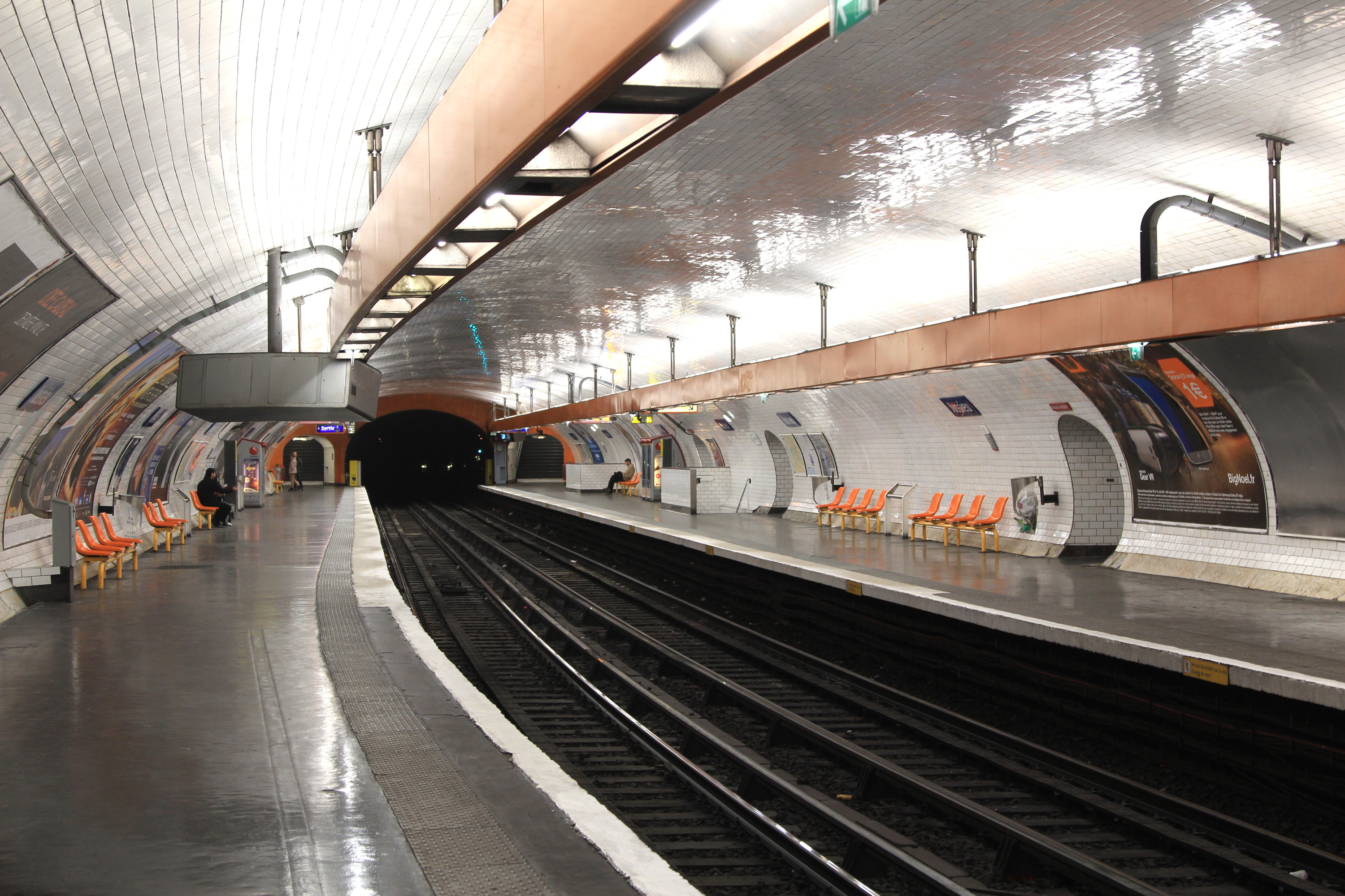 Quais de la station Jussieu, sur la ligne 7 du métro de Paris, en direction d'Ivry et Villejuif.